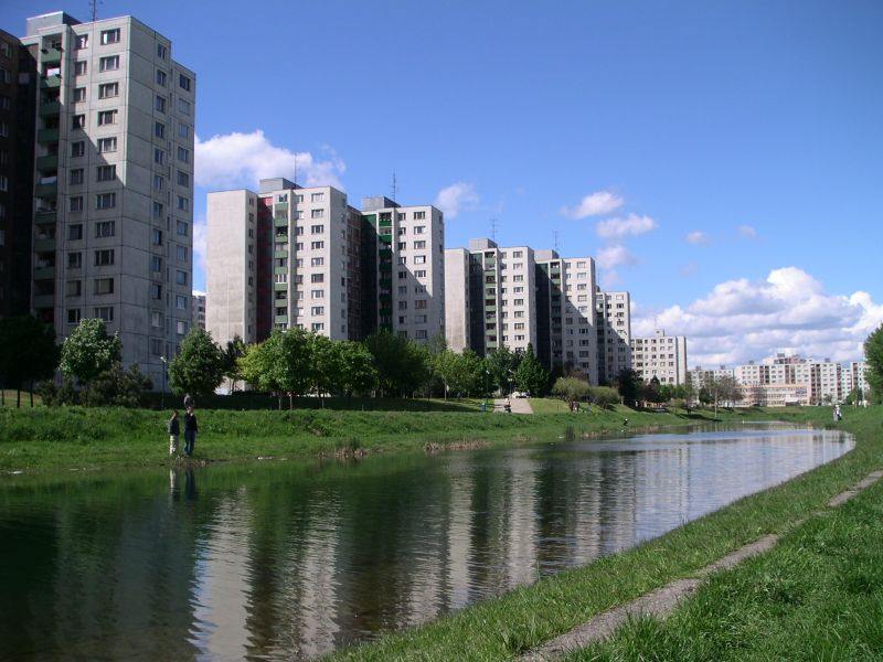 Pohľad na Chorvátske rameno. Poloha: 48°07.135N 17°06.473E Mesto: Bratislava, Slovensko